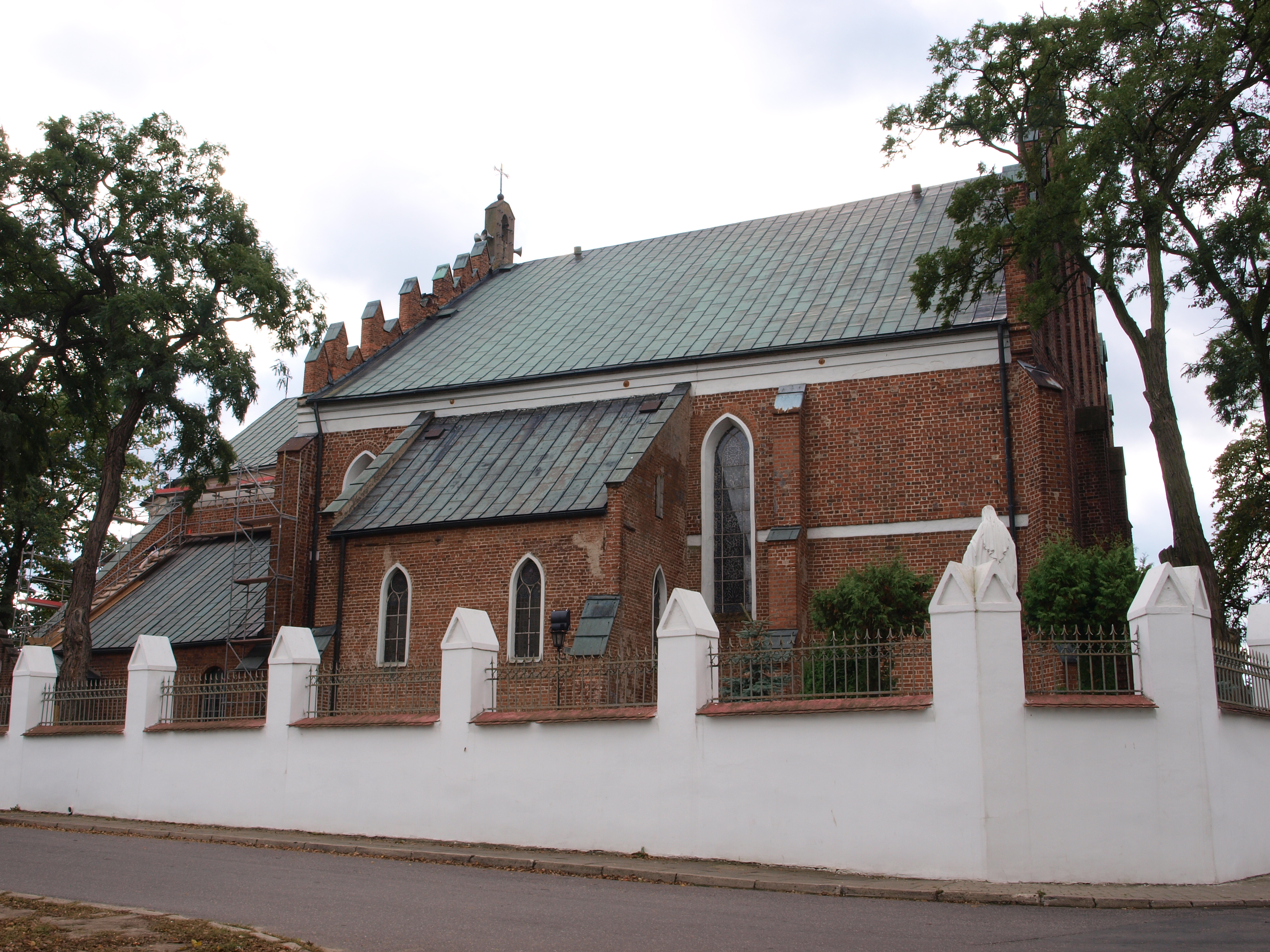 Kościół Wniebowzięcia NMP w Szadku. Widok od ulicy Ogrodowej (zabytek nr 850 z 28.12.1967)